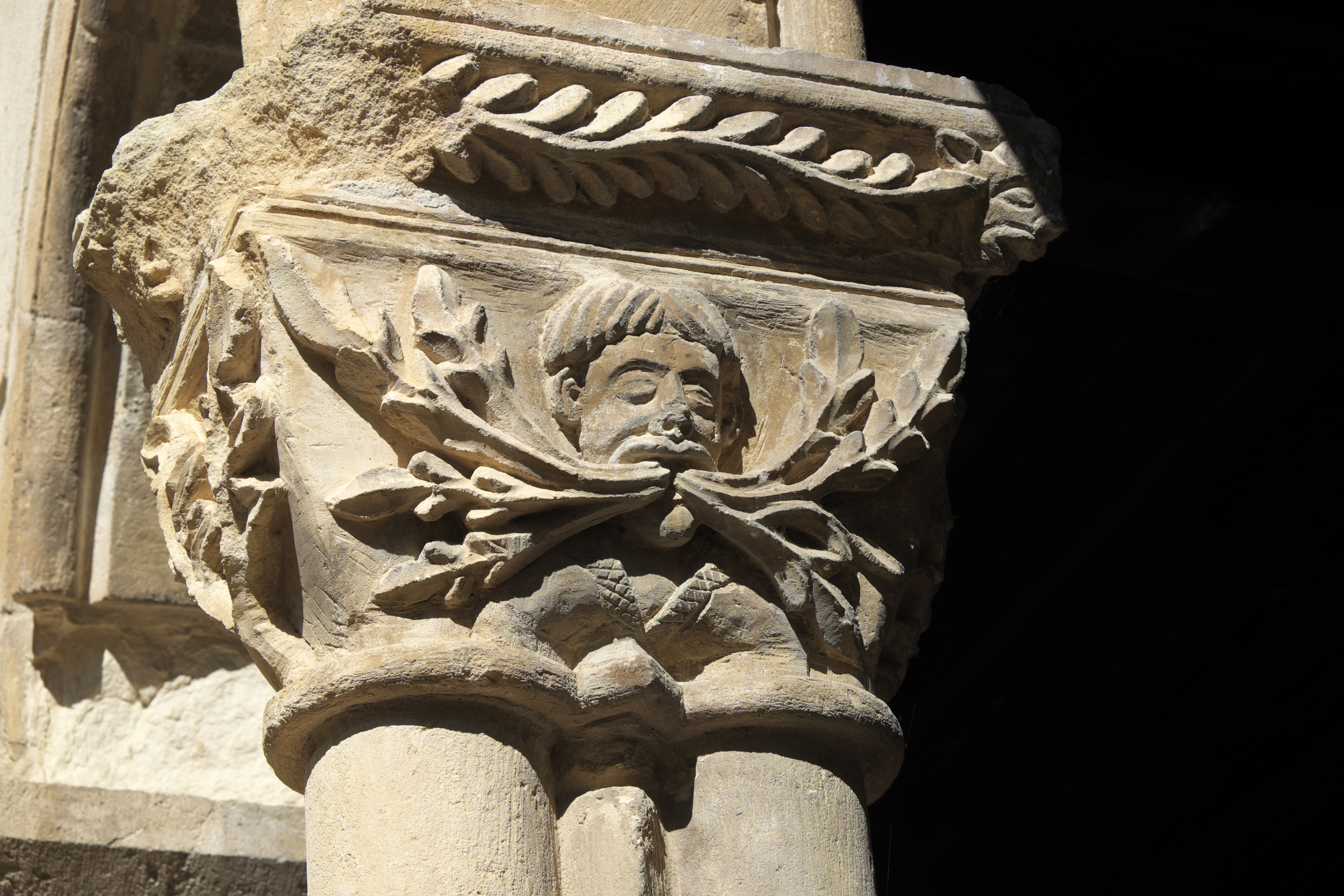 Kreuzgang des ehemaligen Dominikanerklosters in Santa María la Real de Nieva in der Provinz Segovia (Kastilien-León/Spanien), Kapitell der Nordgalerie, Darstellung: Kopf eines Mannes, aus dessen Mund Zweige sprießen (Allegorie der Predigt)